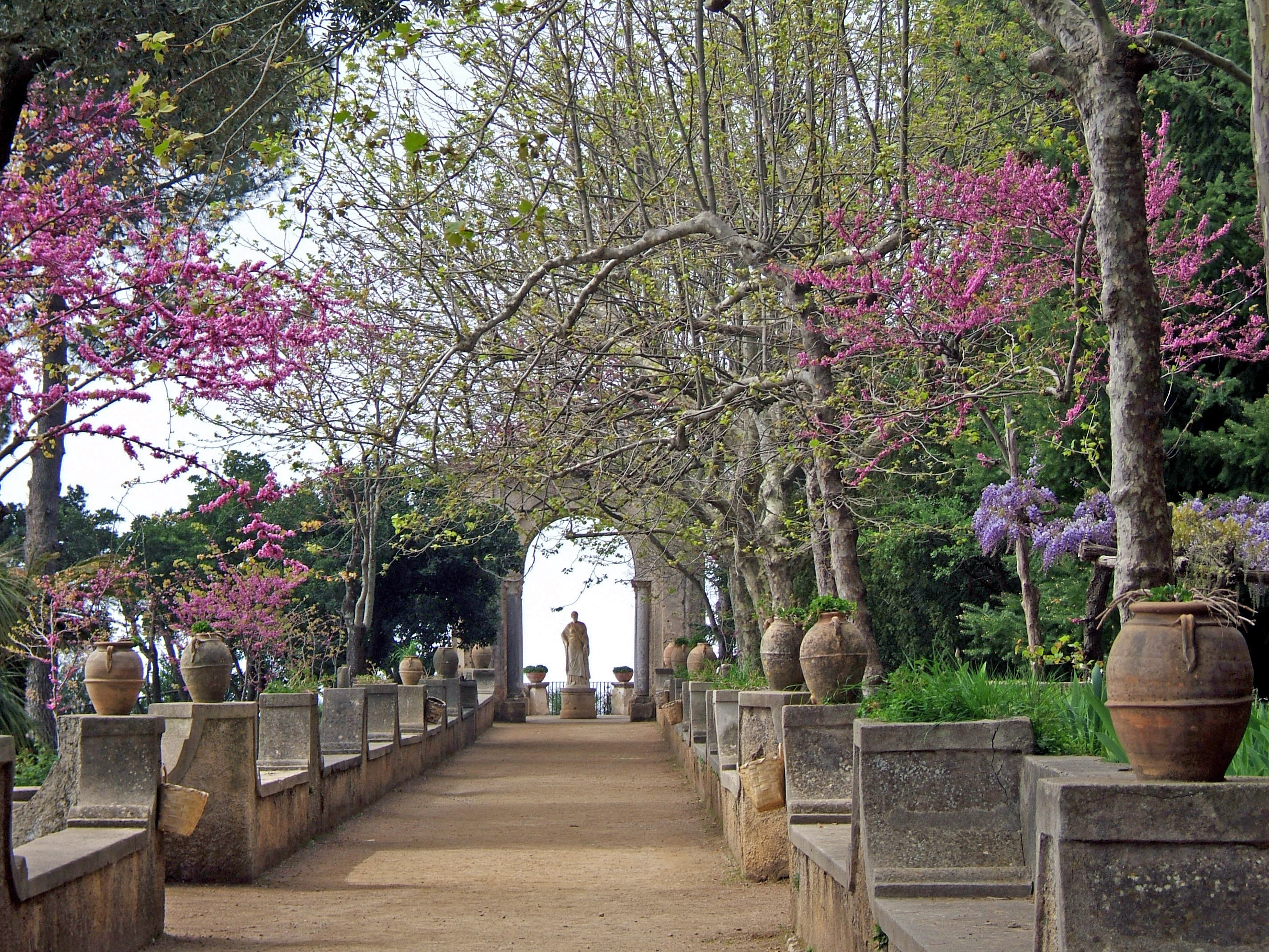 Ravello-Villa Cimbrone Pavillon